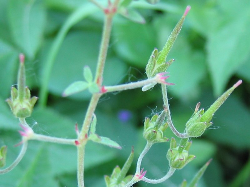 "Schnabel" eines Pyrenäen-Storchschnabels Geranium pyrenaicum